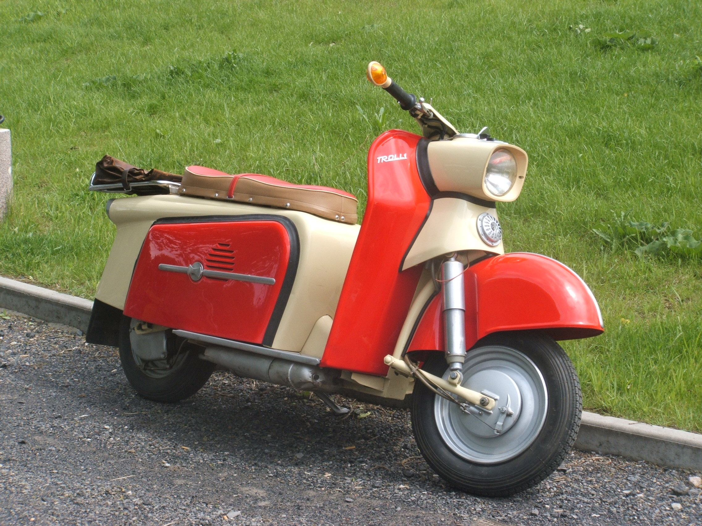 Stadtroller Troll-1 Bj. 1964 aus den Industriewerken Ludwigsfelde